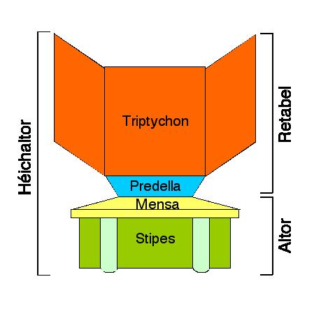 Schematesch Duerstellung vun engem Héichaltor